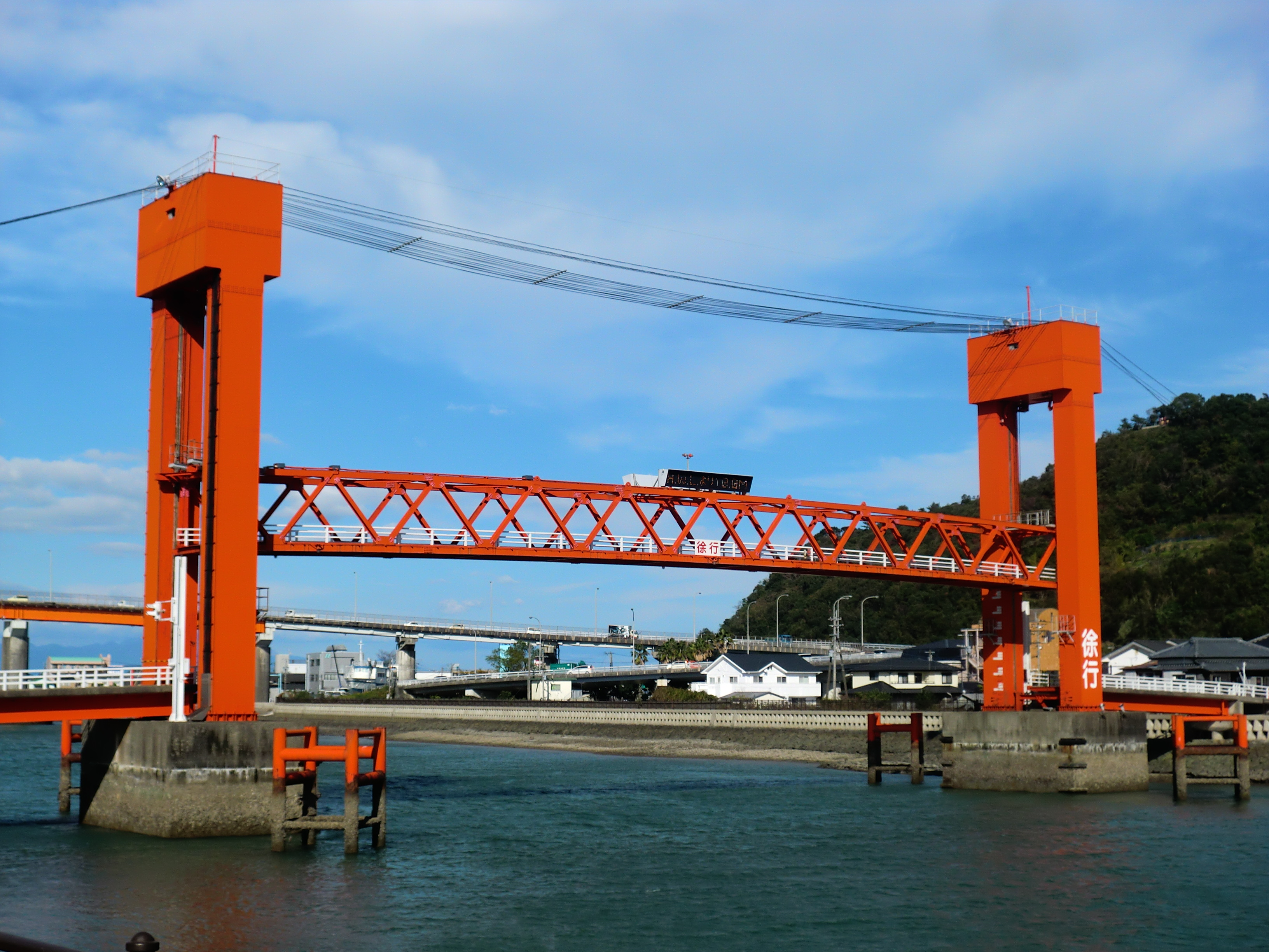 本渡瀬戸歩道橋（開閉時）